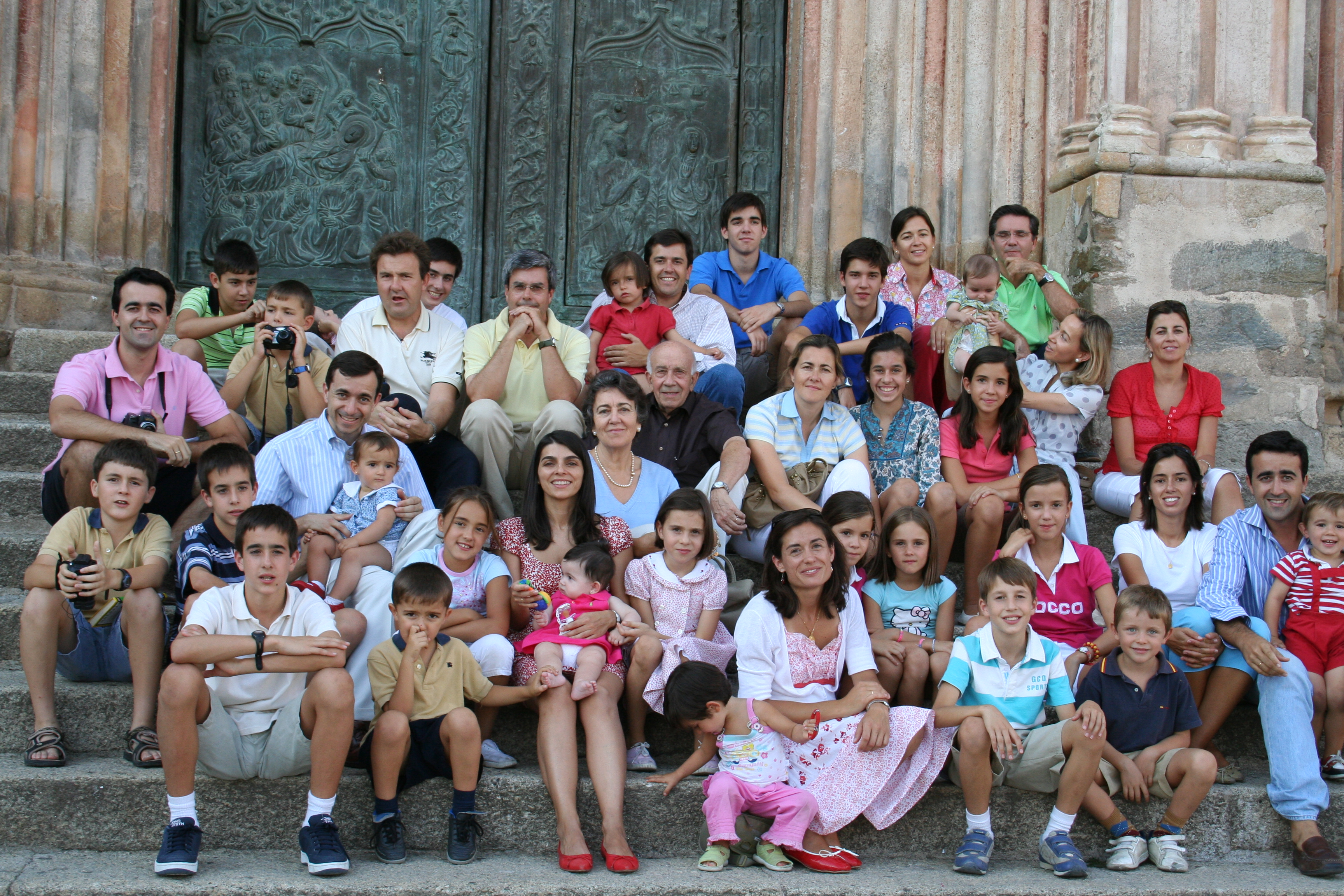 La Familia de Ojeda Ruiz de Luna se reune en Septiembre de 2007 para celebrar el 50 aniversario de boda de los padres de familia. Once hijos, veintisiete nietos. El fruto de un amor entregado. Nos reunimos en el Monasterio de Guadalupe, Cáceres, España. SED FIELES, VALE LA PENA. LA FAMILIA, la clave. LA EDUCACION de los hijos, cansada, pero no dificil. Los padres: Rafael y Maricarmen Los hijos: Rafa, MariCarmen, MariaElena, Juanma, Cuca, Luz, Mar, Willy, Jaime, JoseMaria y Joaquin Los hijos políticos: Blas, Eugenio, Paco, Eva, Laura y Susana. Los nietos: JoseMaria, Jaime, Pilar, Cristina y MariaElena Andres, Luz, Joaquin, Pablo, Alvaro, Almudena y MariaEugenia Santi, Edu, Ana, Javier, Fernando, Rocio Maria, Jaime, Isabel, Macarena y Miguel JoseMaria, Elena Alejandra